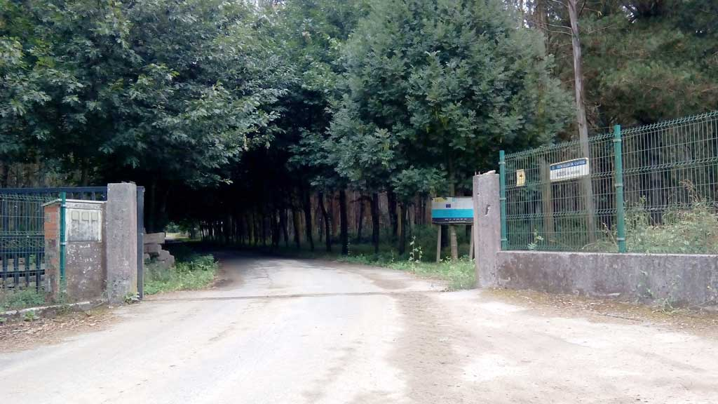 Vista de Bouza de Mouros, Curtis.